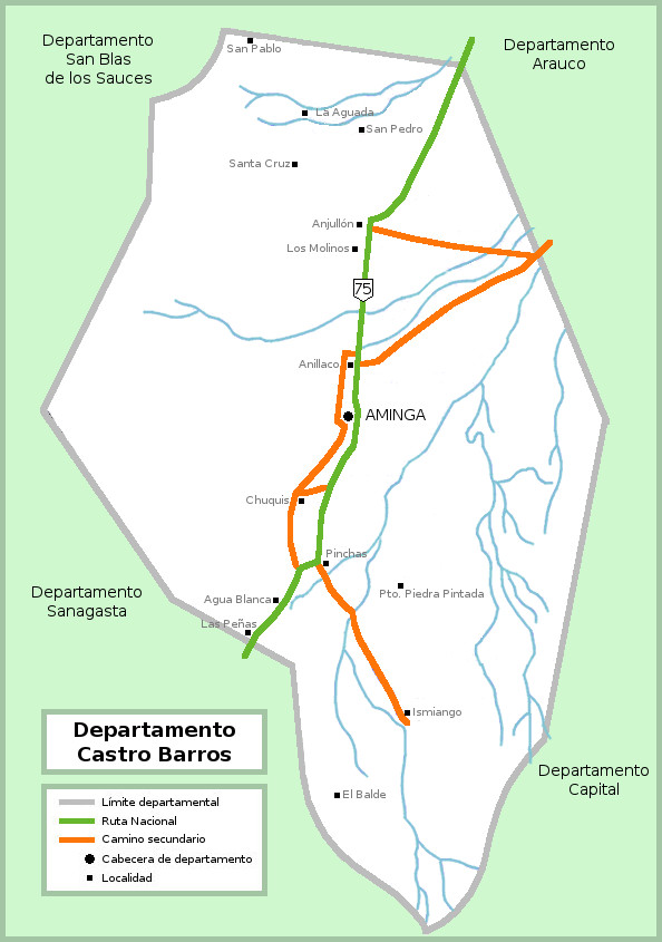 Localidades y parajes del Departamento Castro Barros, La Rioja, Argentina